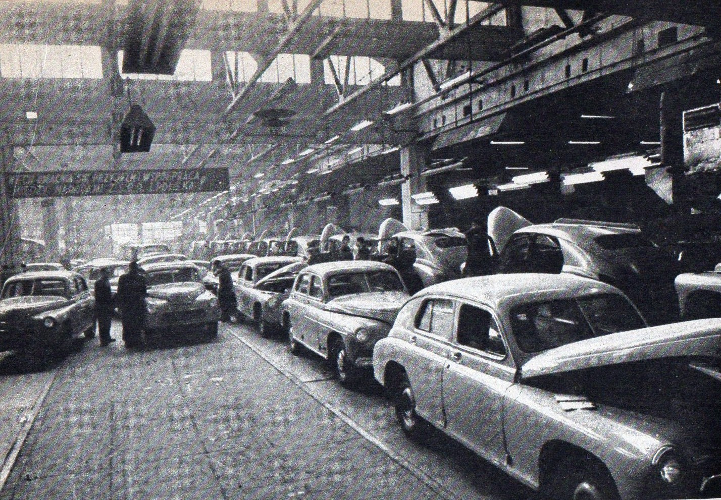 Linia montażowa Warszaw. Lata 50. XX wieku.